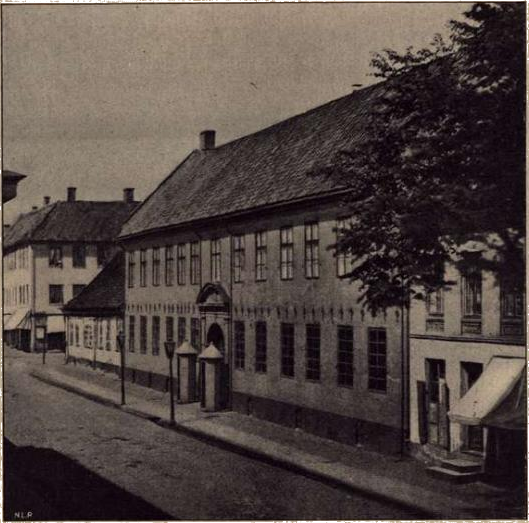 Stiftsgården i Christiania (Rådhusgaten 13) ca. 1860.